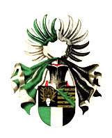 Studentenwappen des Corps Hercynia Tharandt (1932-1935)